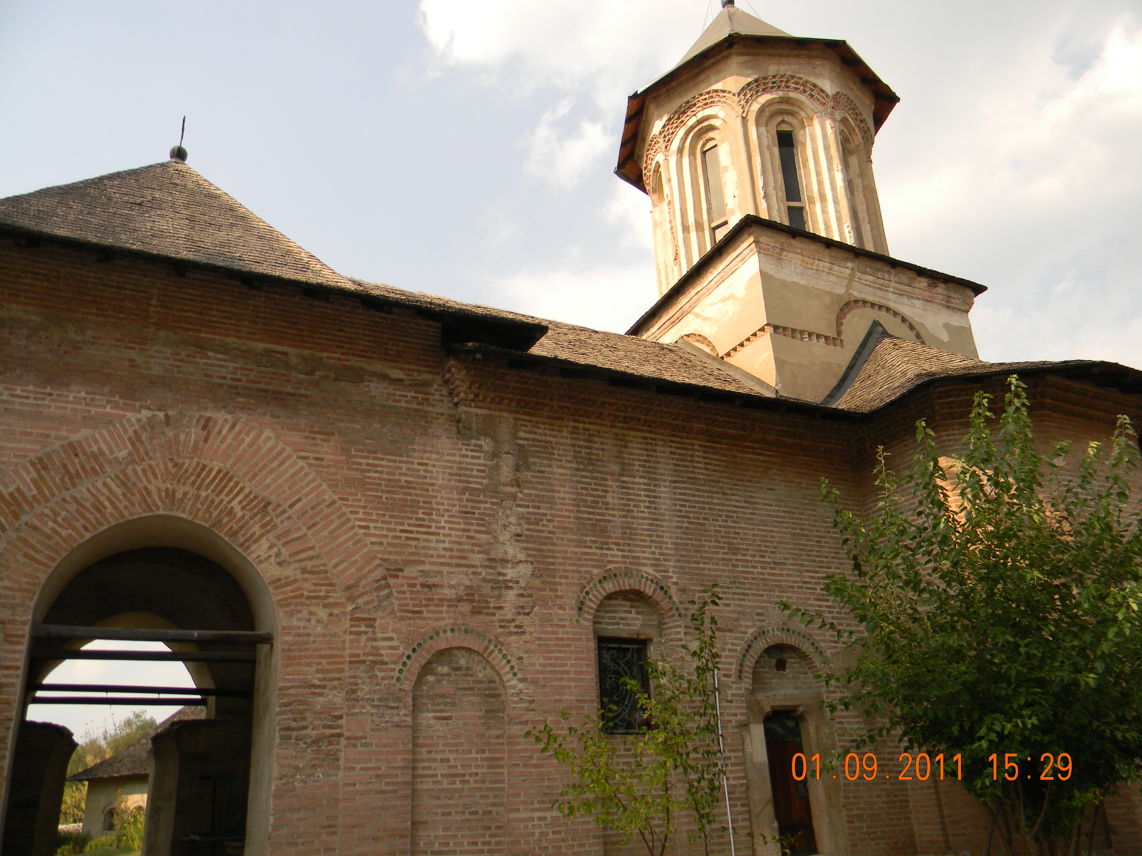 Biserica Domneasca mica 05